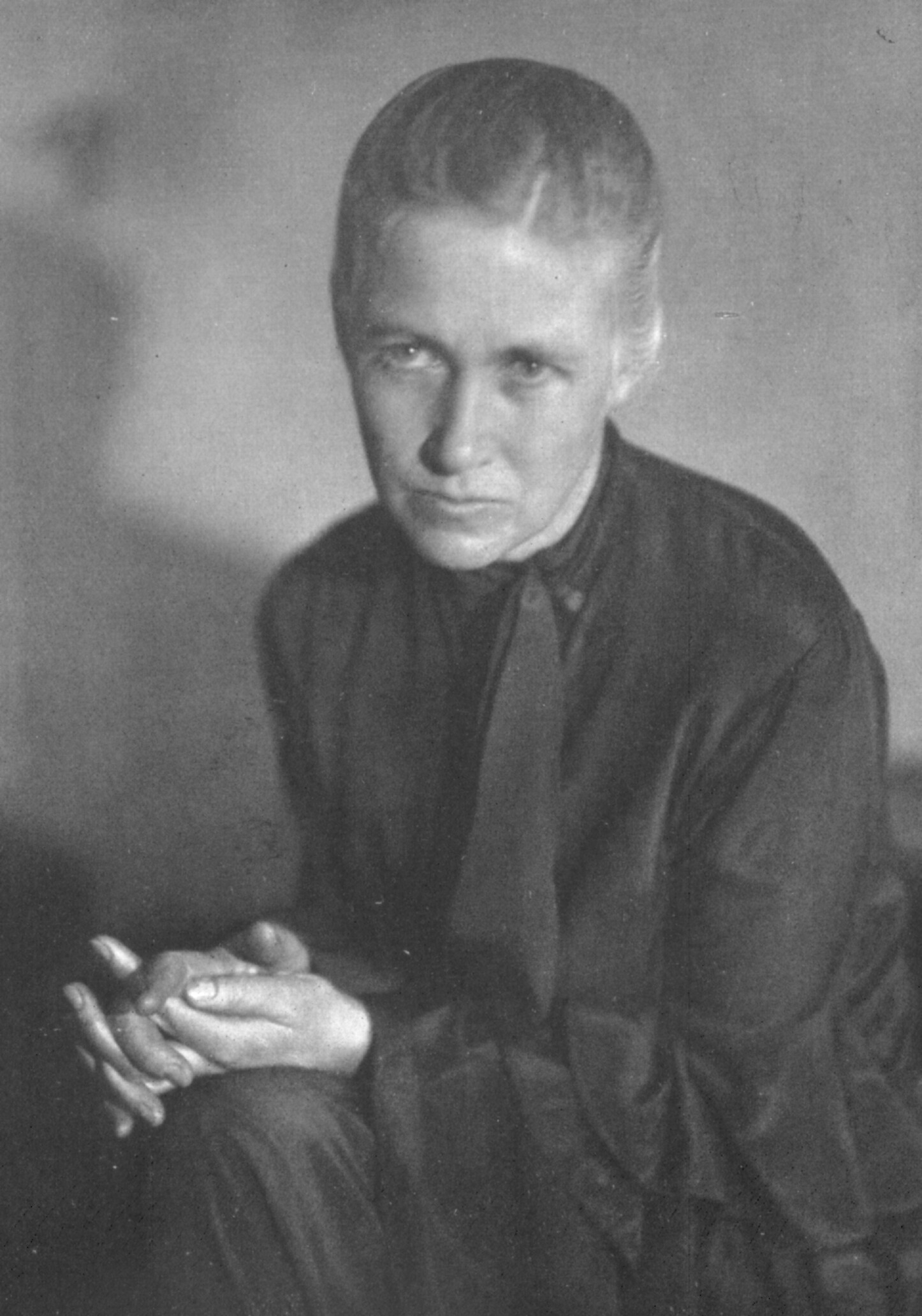 Porträt Käte Schaller-Härlin, Foto von Wanda von Debschitz-Kunowski (1870-1935)